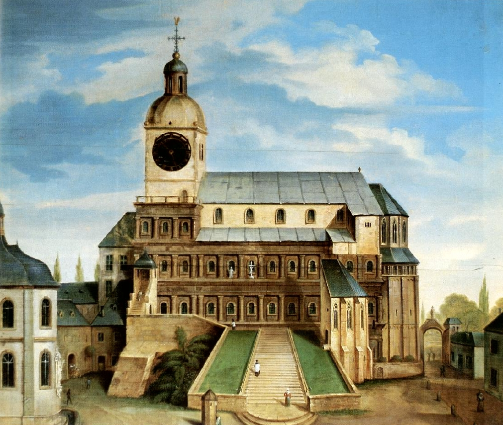 Bilderuhr "Porta Nigra als St. Simeonskirche", gemalt von Ludwig Neureuther in Trier, um 1840 (Stadtmuseum Simeonstift Trier)